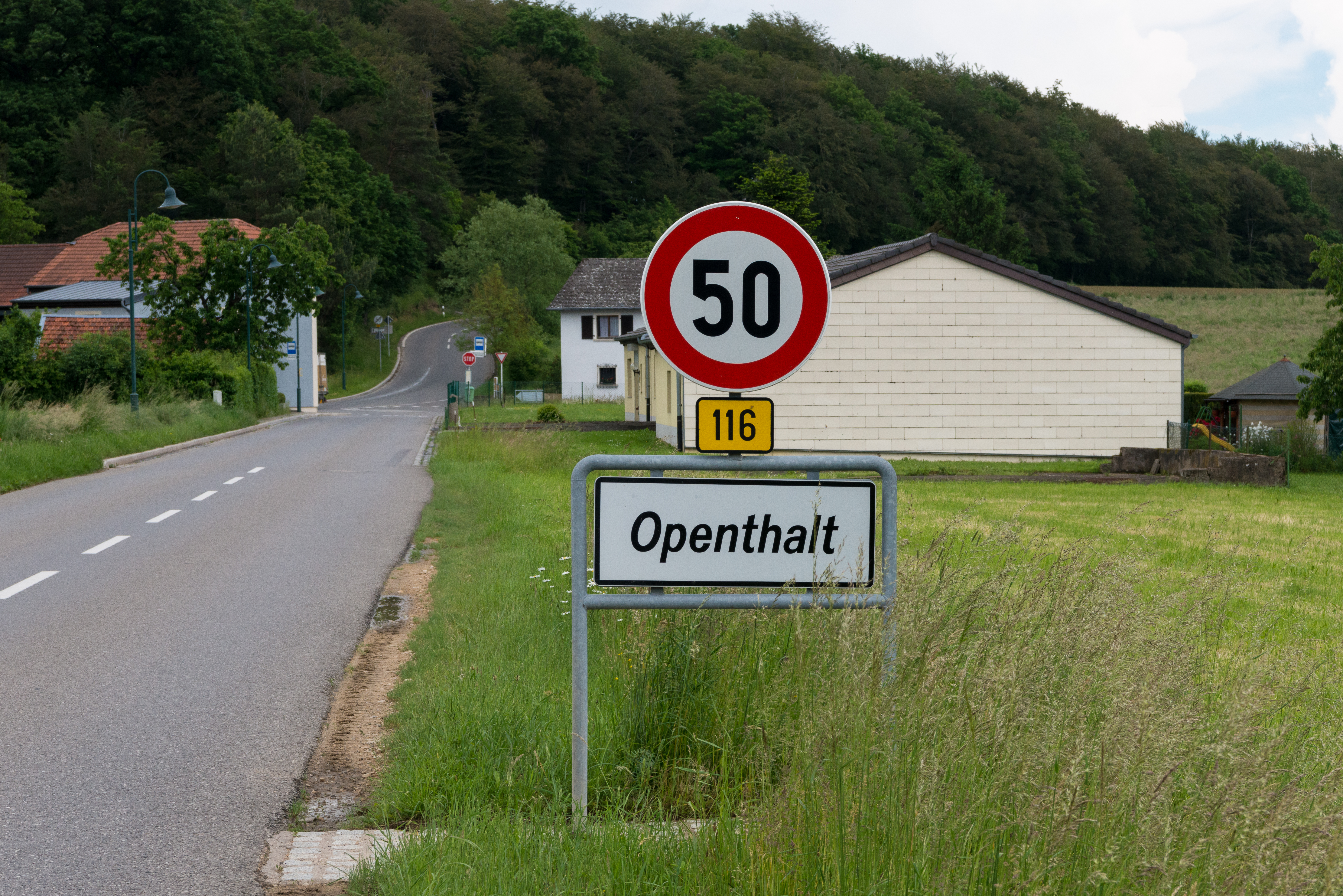 Den Openthalt a Richtung Osten.